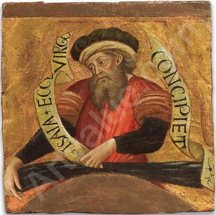 Profeta Isaia